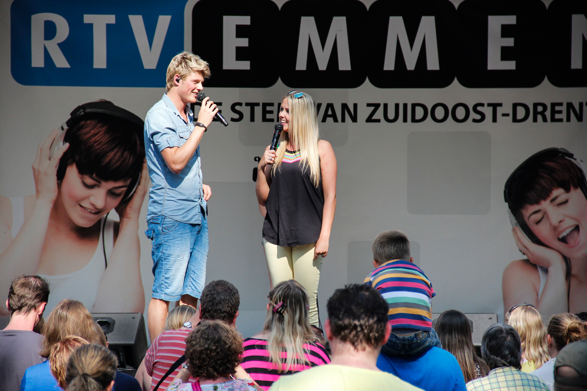 Tim Douwsma & Monique Smit tijdens een optreden bij Alles Kids in Drenthe 2013